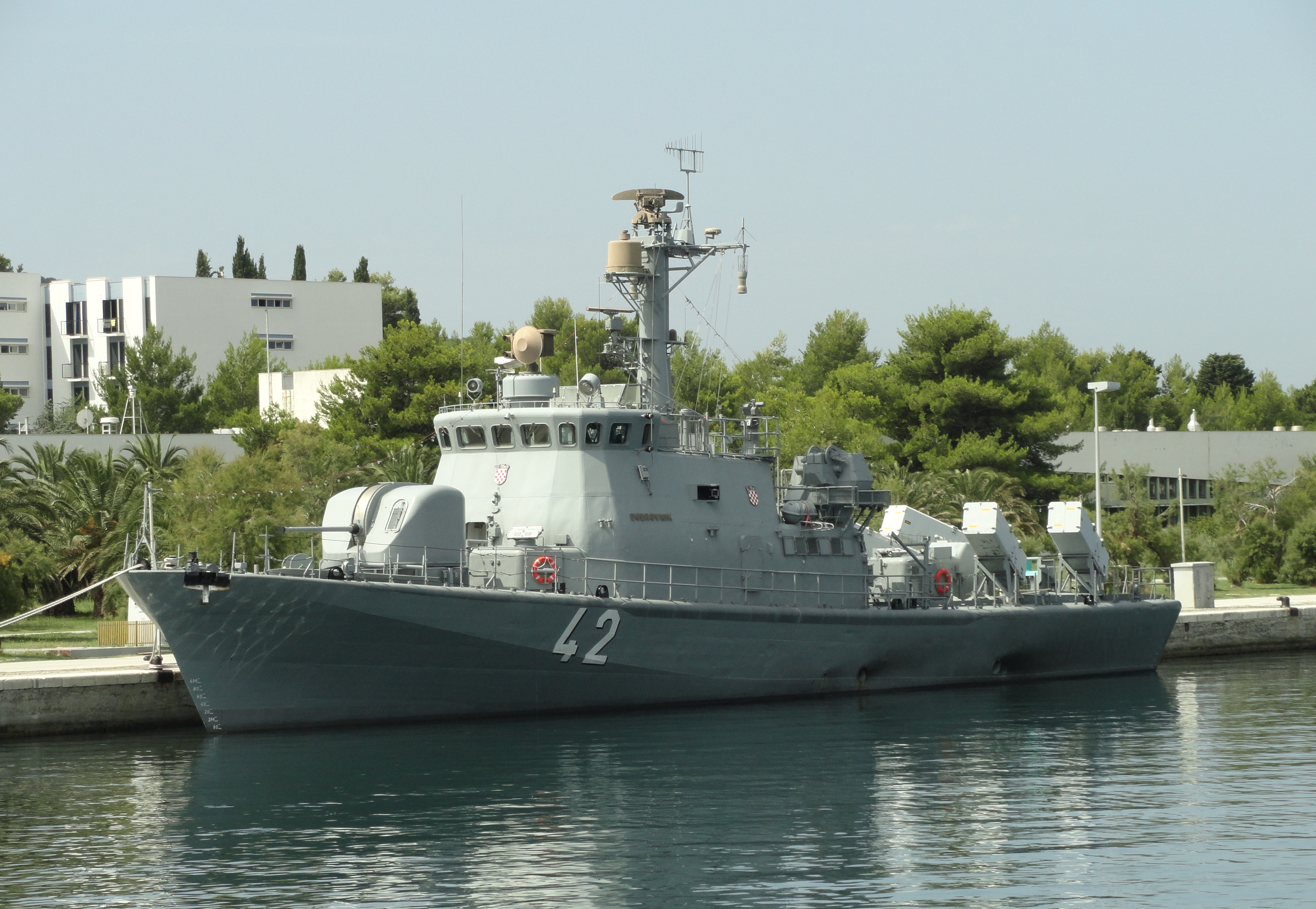 RTOP-42 Dubrovnik u Lori.